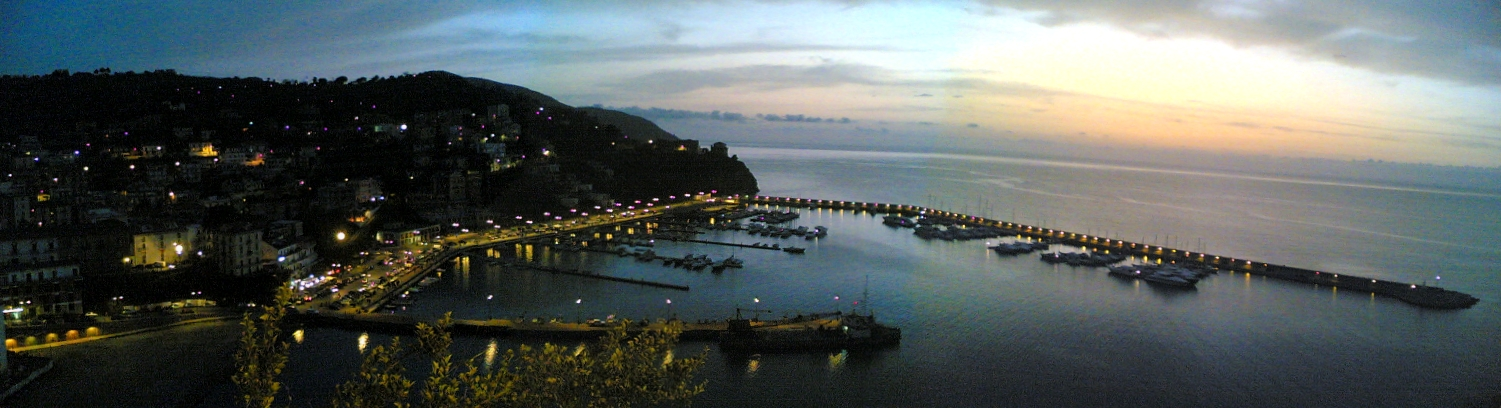 Carlo Iannuzzi, Opera Propria, Agropoli - Il Porto al Tramonto, GFDL e Creative Commons CC-BY-SA tutte le versioni (3.0, 2.5, 2.0 e 1.0), sono l'autore